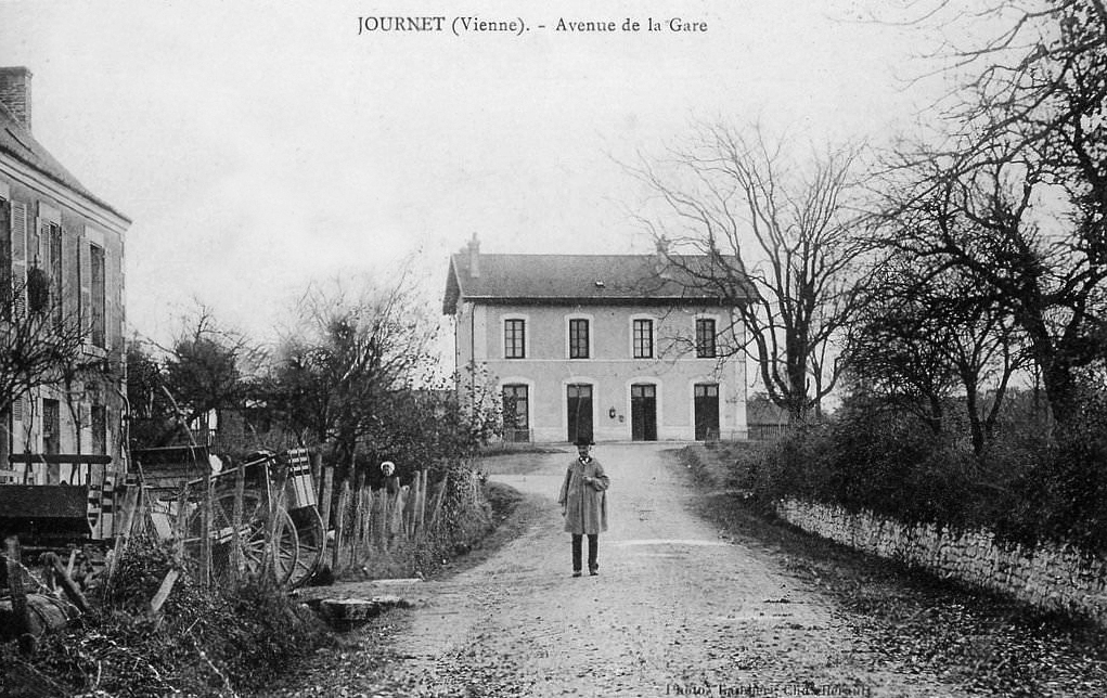 La rue de la gare et le bâtiment voyageurs.